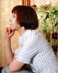 Фото української графікині Ольги Вікторівни Лебідь